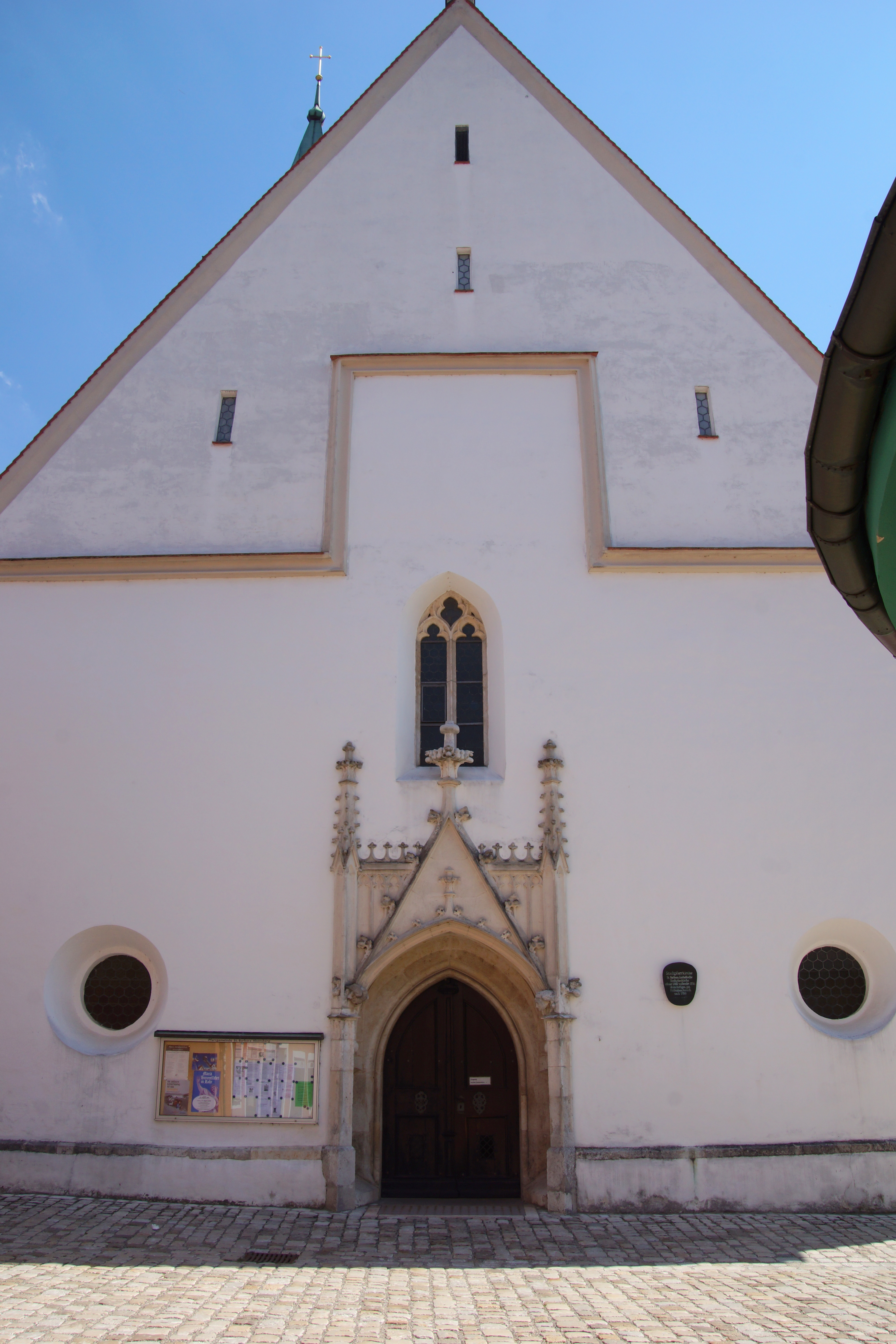 Die Pfarrkirche St. Barbara in Abendsberg